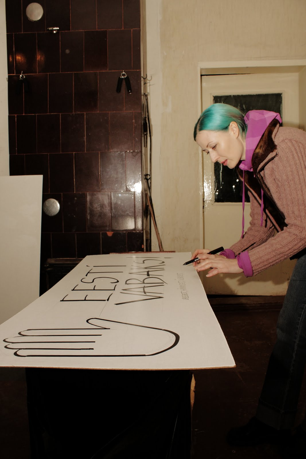 Kunstnik Signe-Fideelia Roots valmistamas plakatit meeleavalduseks 13. novembril 2012.